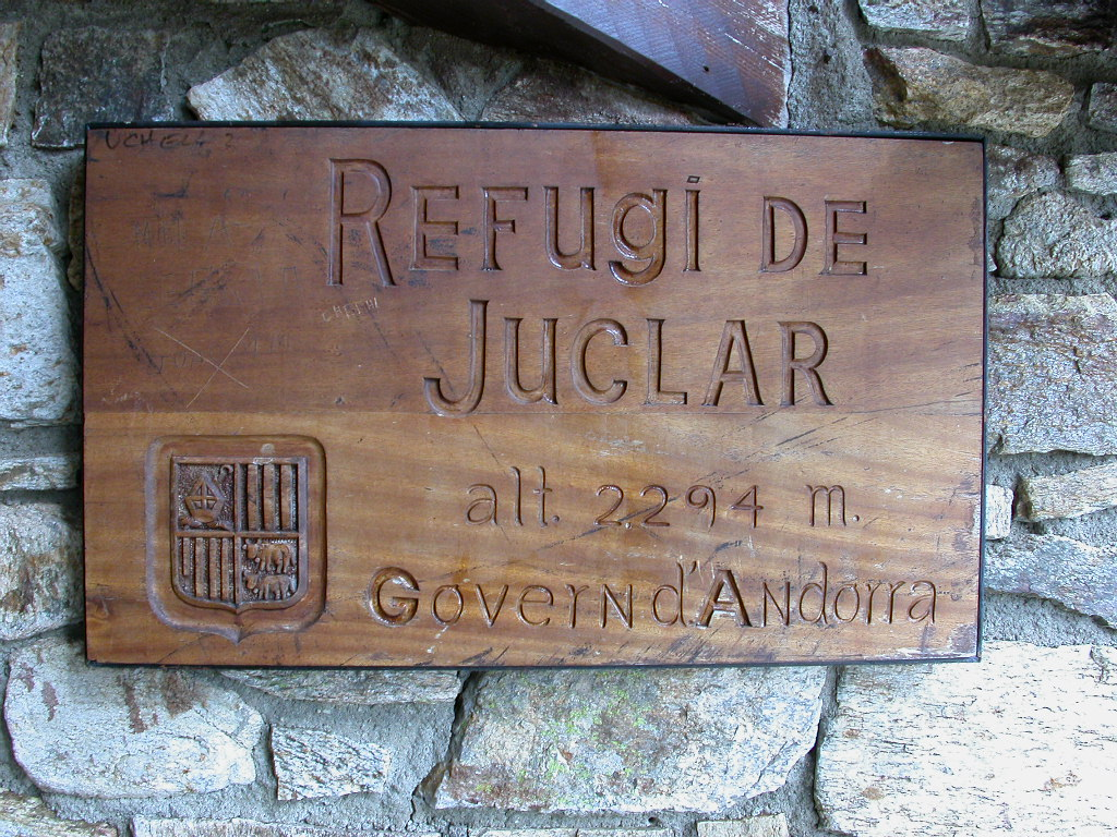 Refuges Andorre